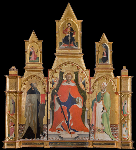 Collegiata di Santa Maria Assunta